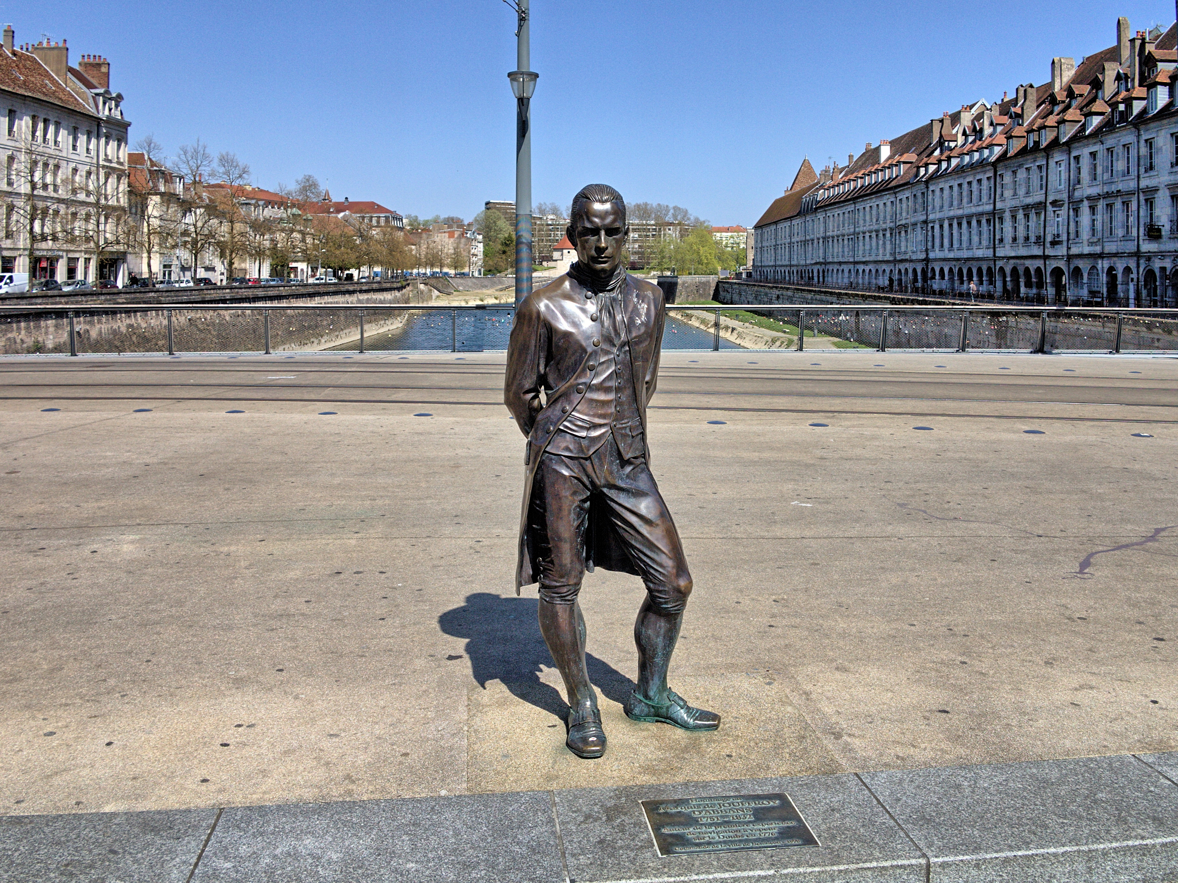 Statue de Jouffroy d'Abbans de Pascal Coupot